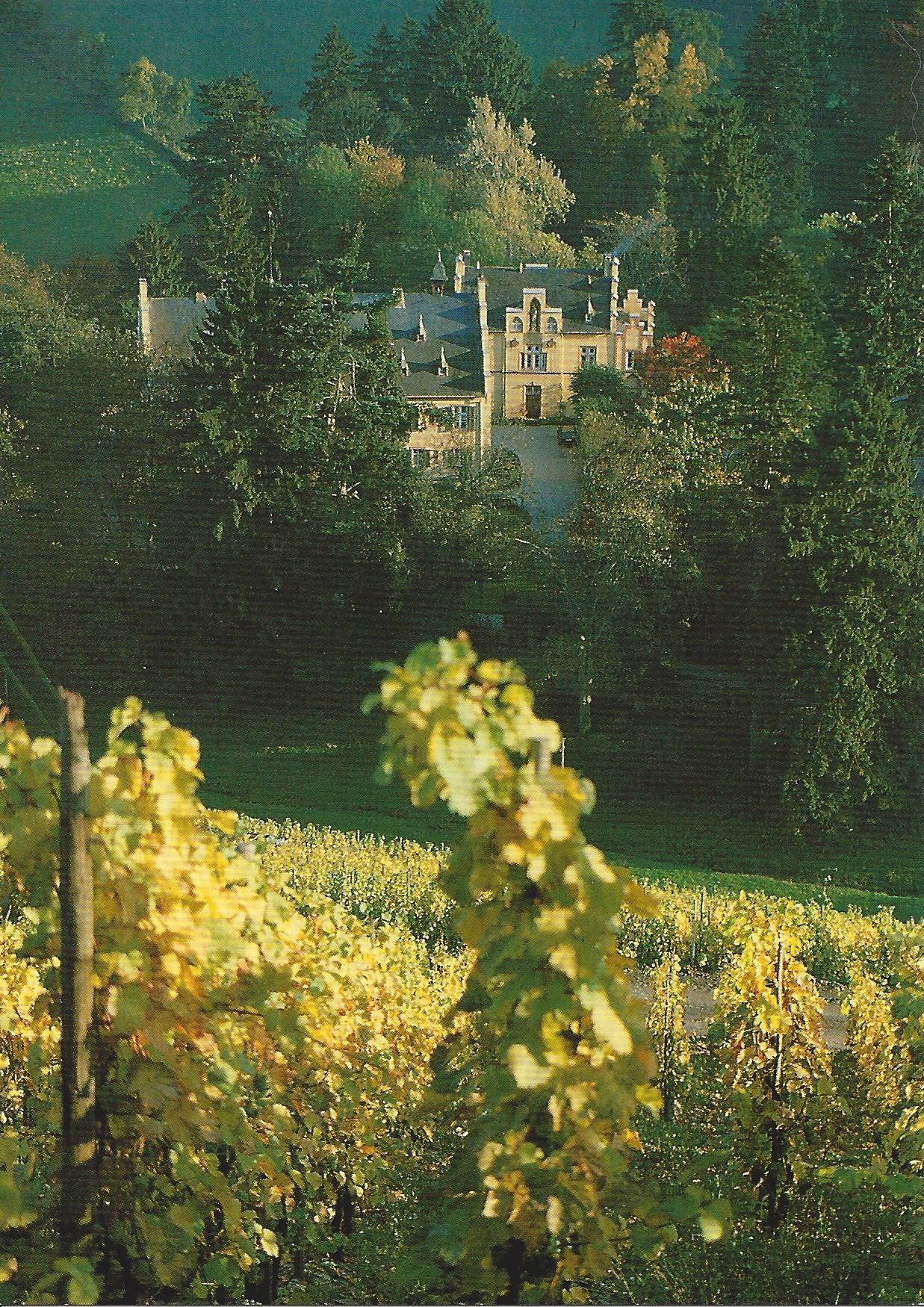 Ansicht des Weinguts Maximin Grünhaus vom Grünhäuser Herrenberg